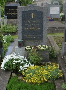 Friedhof Mauer-Heinz Kratochwil